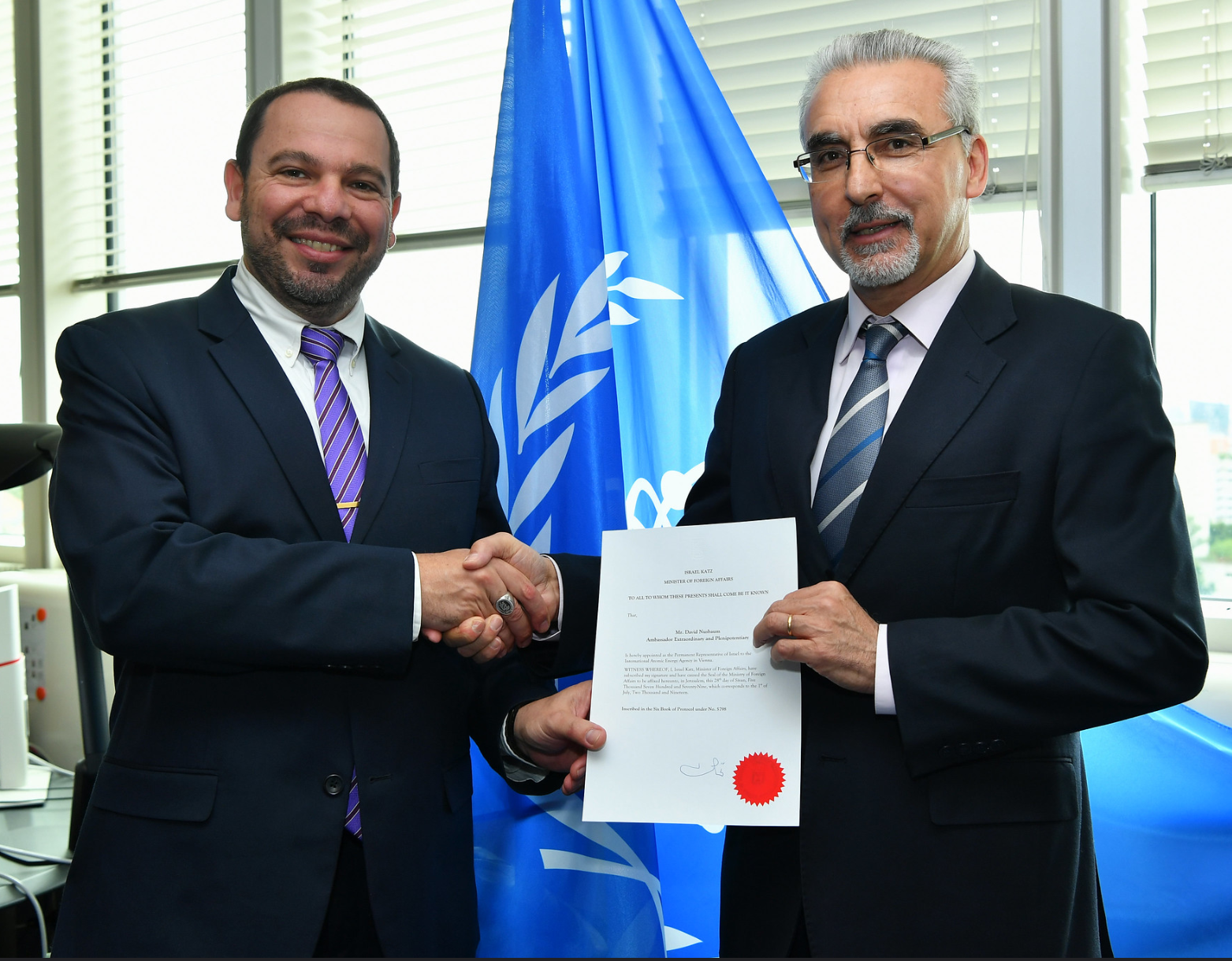 השגריר החדש של ישראל לסוכנות הבינלאומית לאנרגיה אטומית, מר דוד נוסבאום, מגיש את כתב המינוי שלו